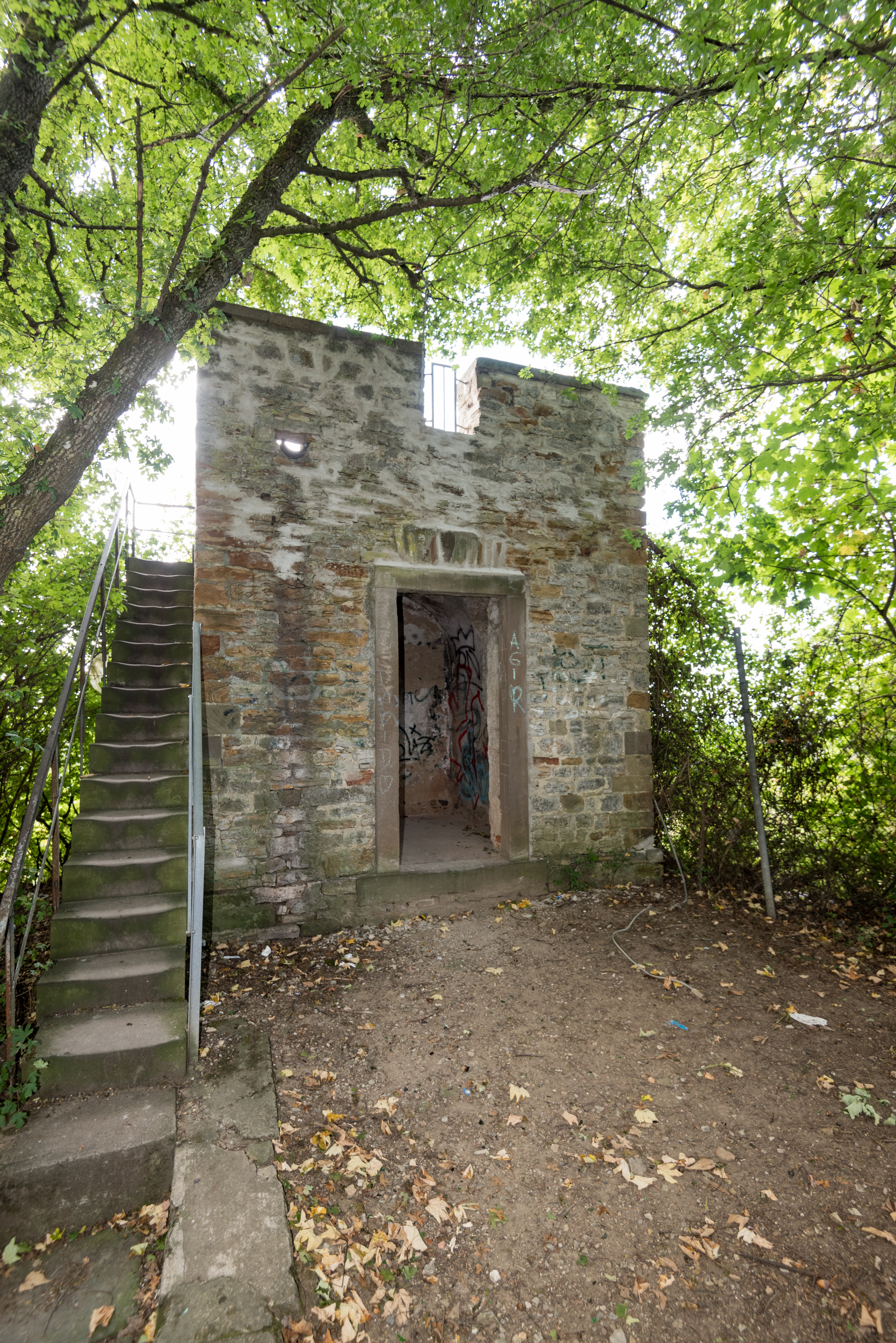 Schweinfurt, Untere Mainleite, Aussichtsturm